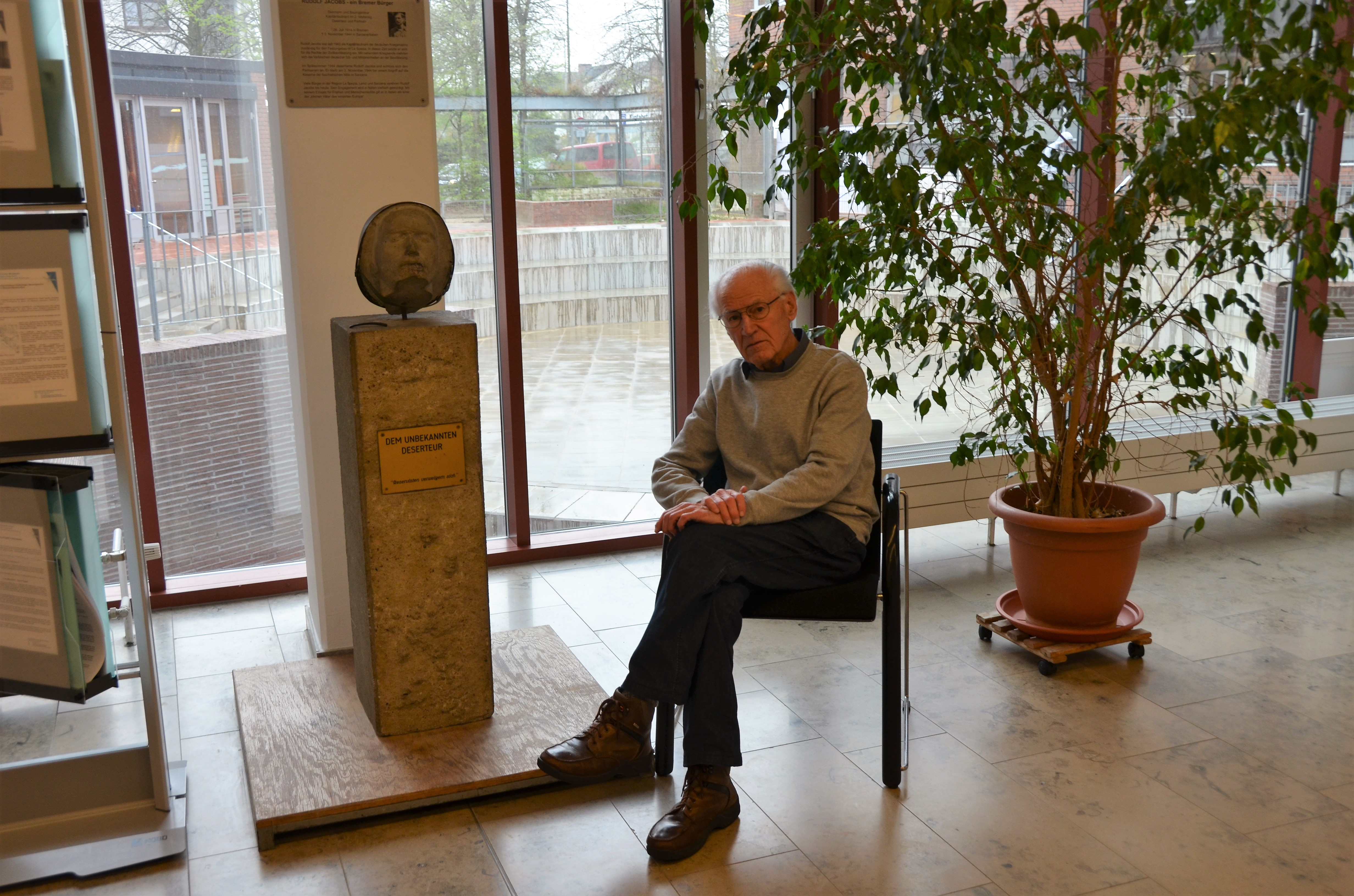 Ludwig Baummann am Denkmal für den unbekannten Deserteur im Gustav-Heinemann-Bürgerhaus in Bremen-Vegesack